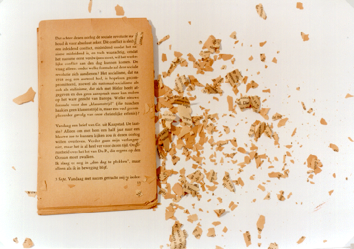 Het brosse papier is zichtbaar. Het valt vanzelf uit elkaar.